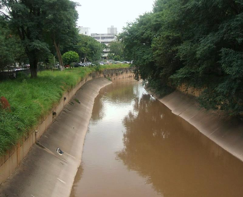 Córrego Pirajuçara, entre a Cidade Universitária e a Academia de Polícia, no bairro do Butantã. Cidade de São Paulo, Brasil.